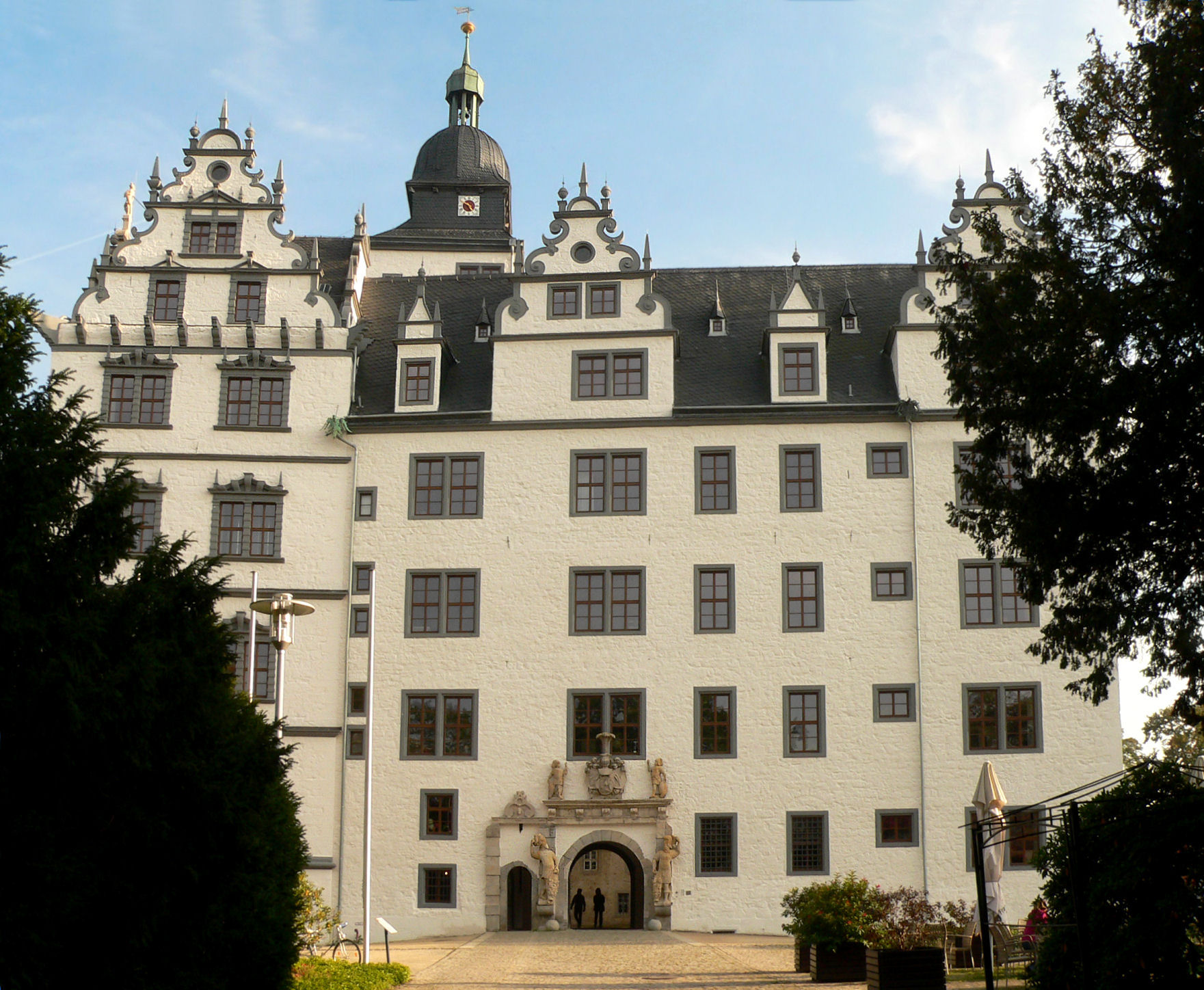 Neu gestalteter Nordflügel von Schloss Wolfsburg